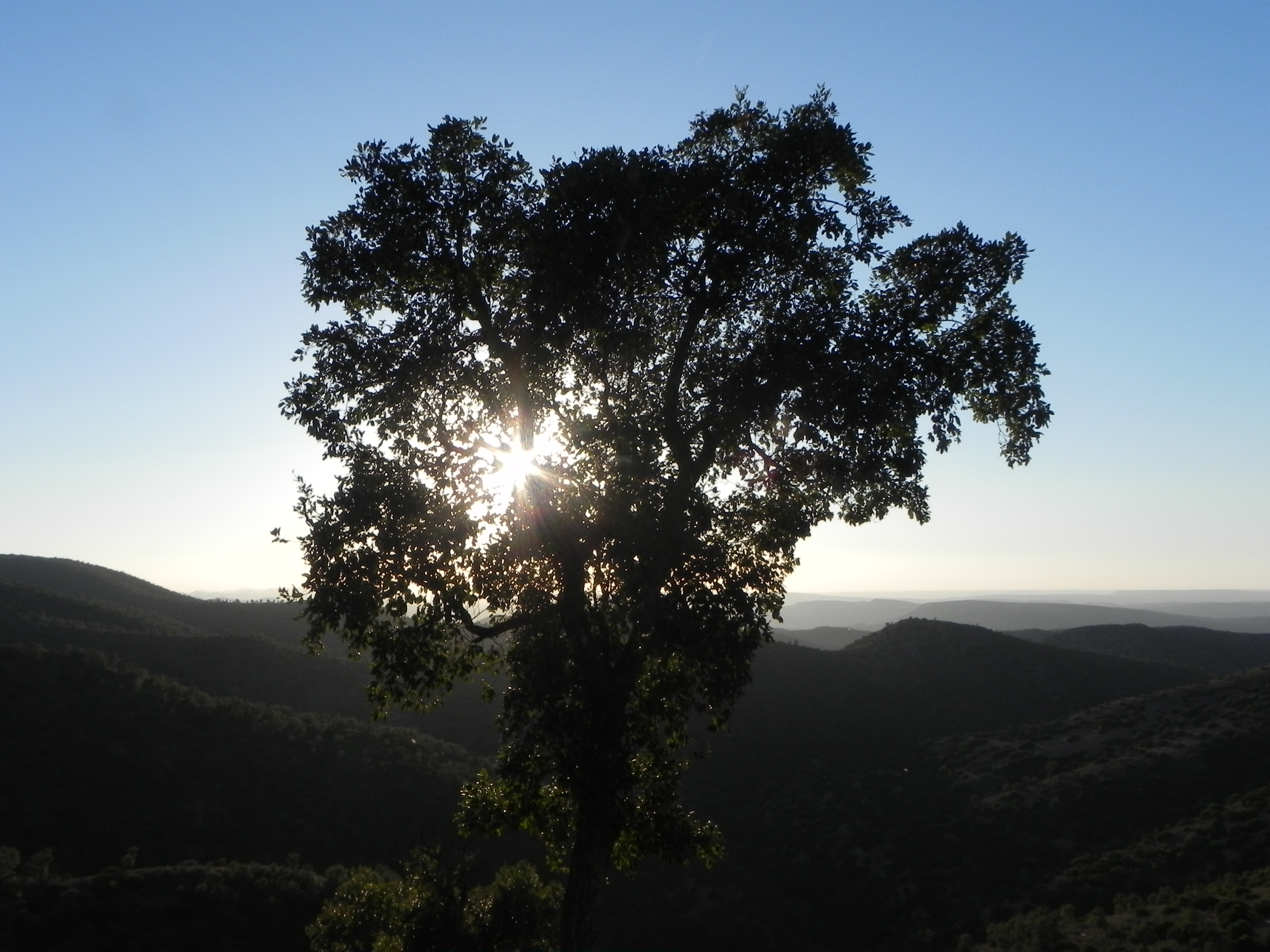 Nature de commune Ait Iko province de Khémisset Maroc